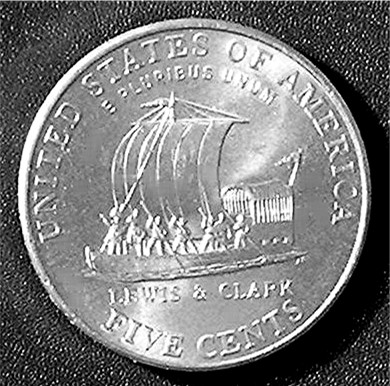 De munt is een Amerikaanse 'stuiver' (nickel) die ter gelegenheid van de expeditie van Lewis en Clack 200 jaar geleden geslagen is.